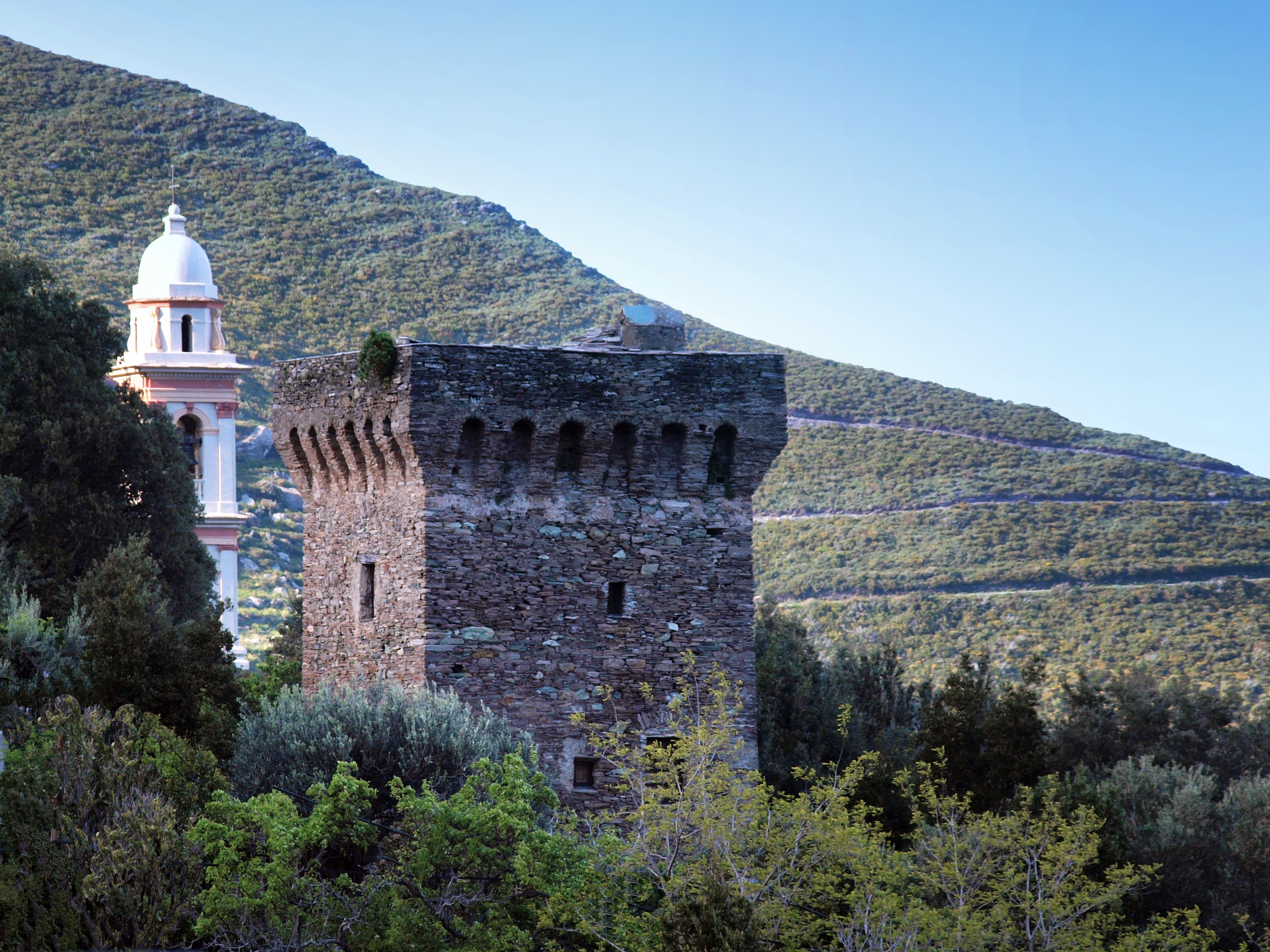 Sisco, Cap Corse (Corse) - La tour carrée (16e s.) au hameau de Monacaja. En arrière le clocher de l'église Saint-Martin à Poggio